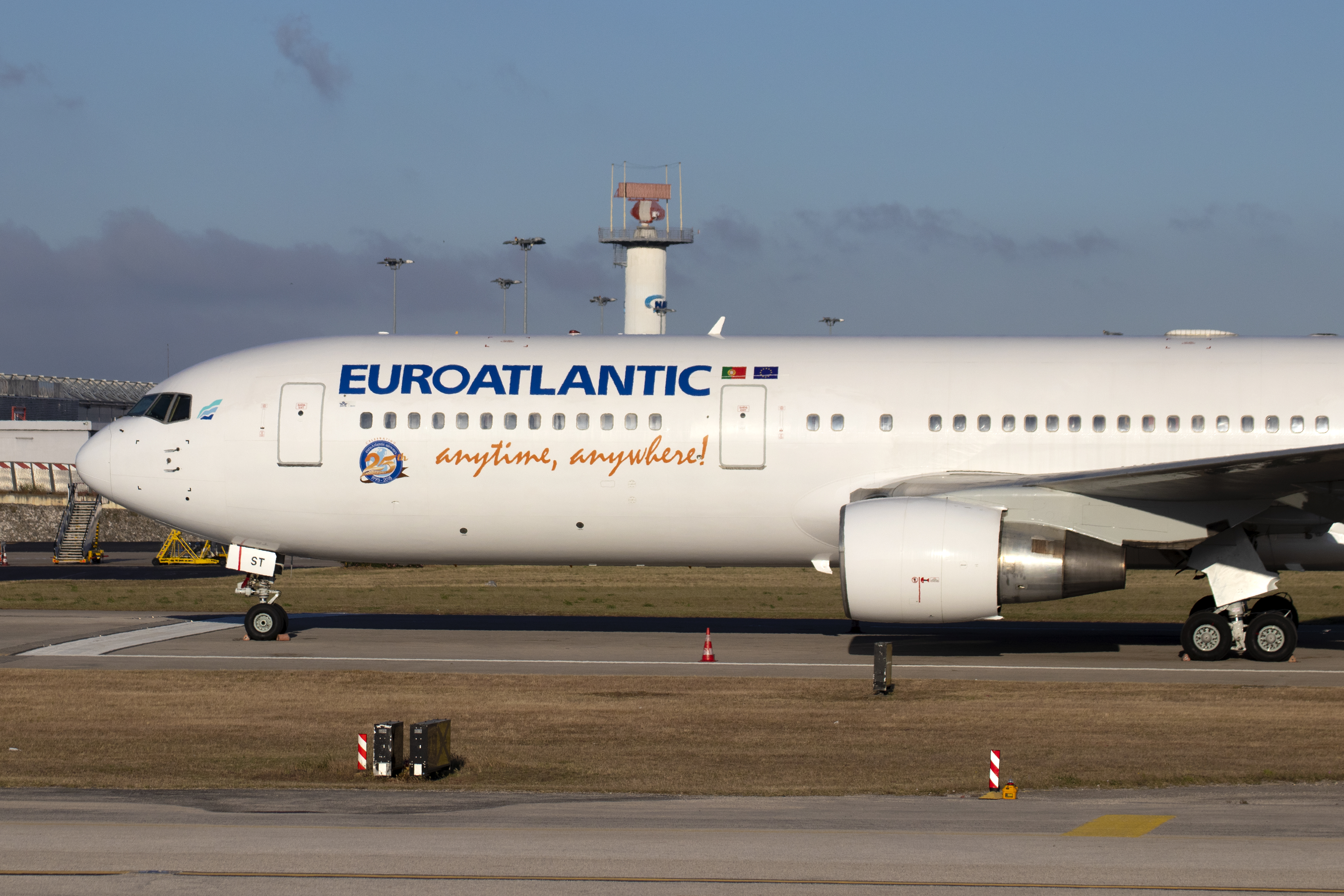 Boeing 767 de Euro Atlantic Airways no aeroporto de Lisboa.